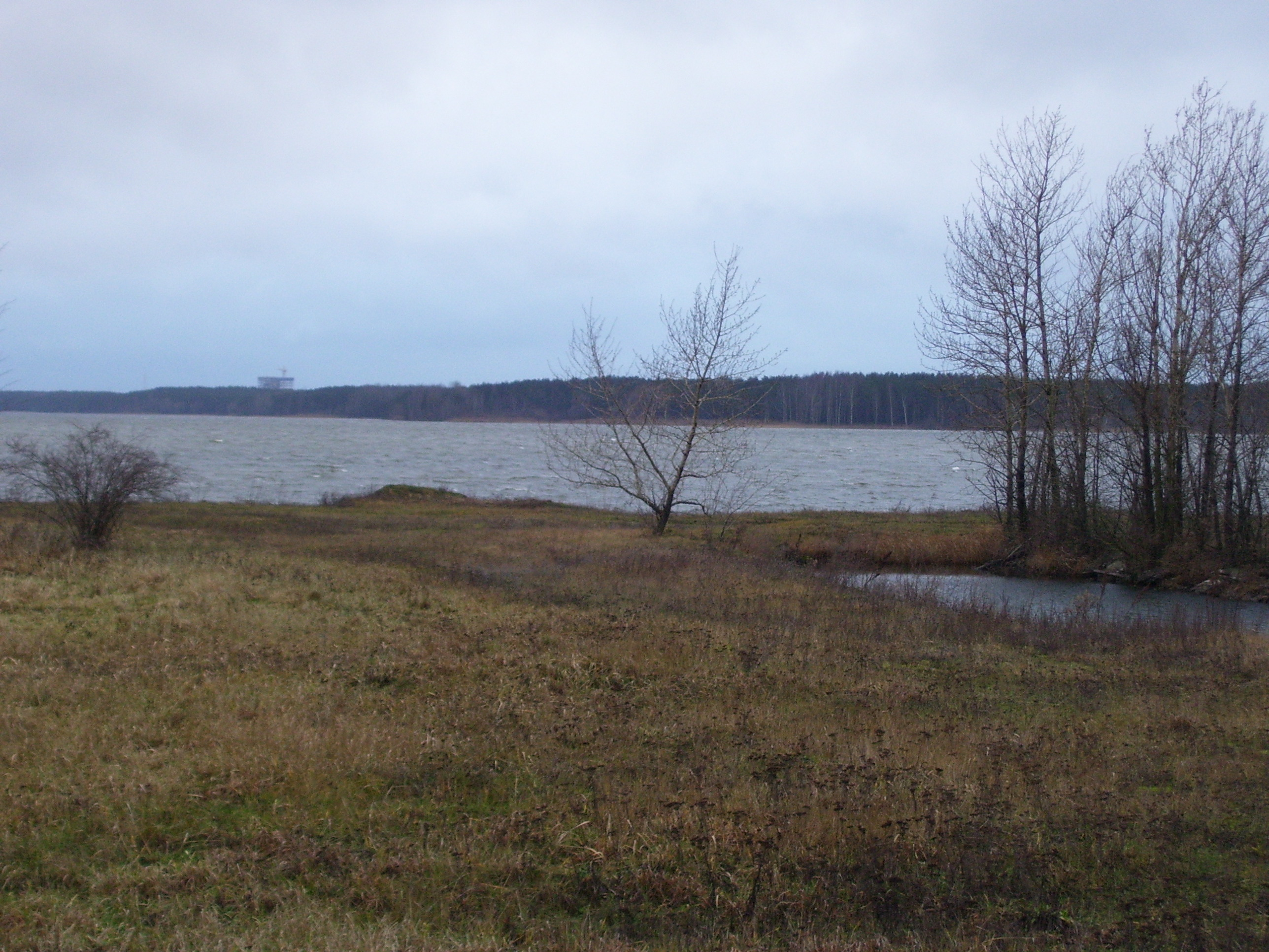 The Lake of Ülemiste (Ülemiste järv), Tallinn, Estonia